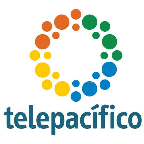 Logo de Telepacífico